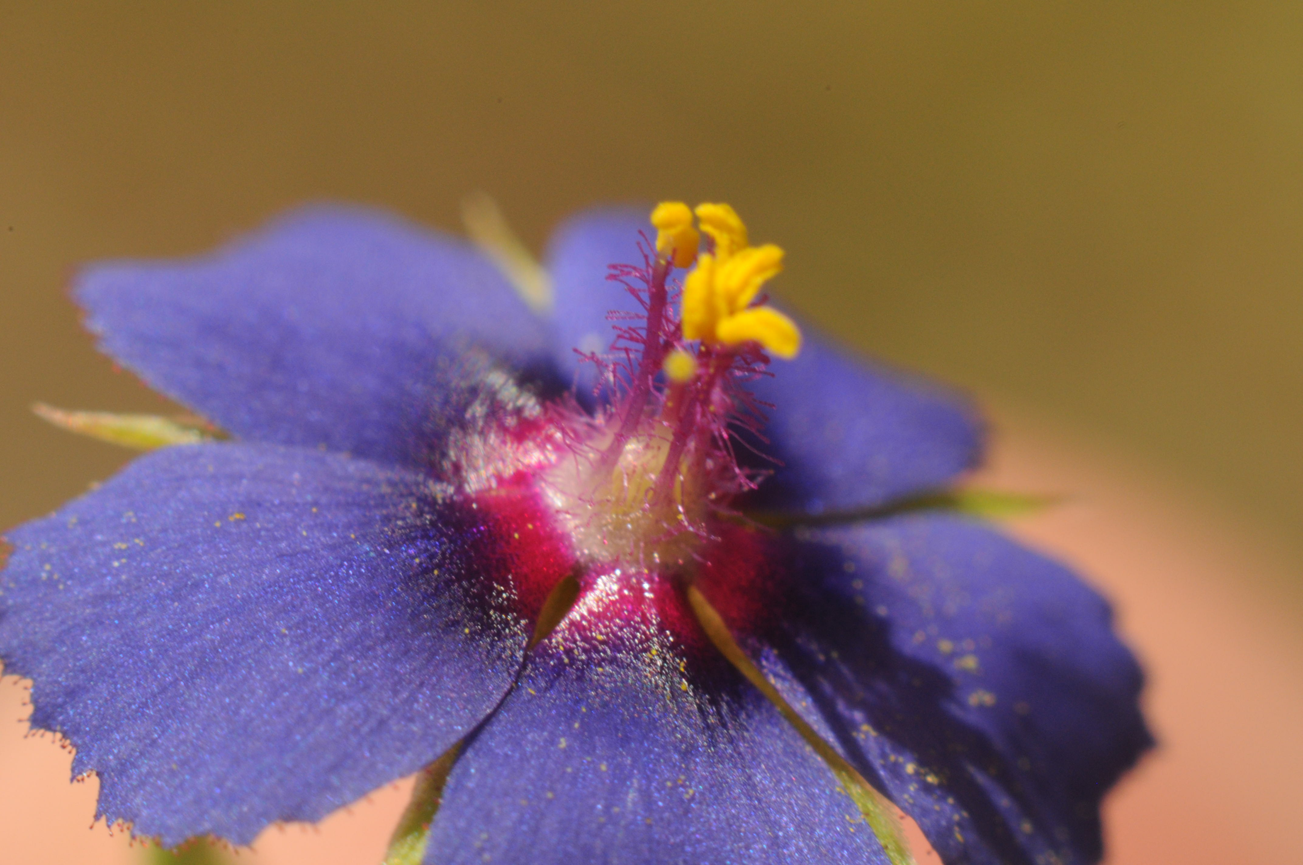 Blaue Form des Anagallis arvensis auf L aPalma. Makroaufnahme.